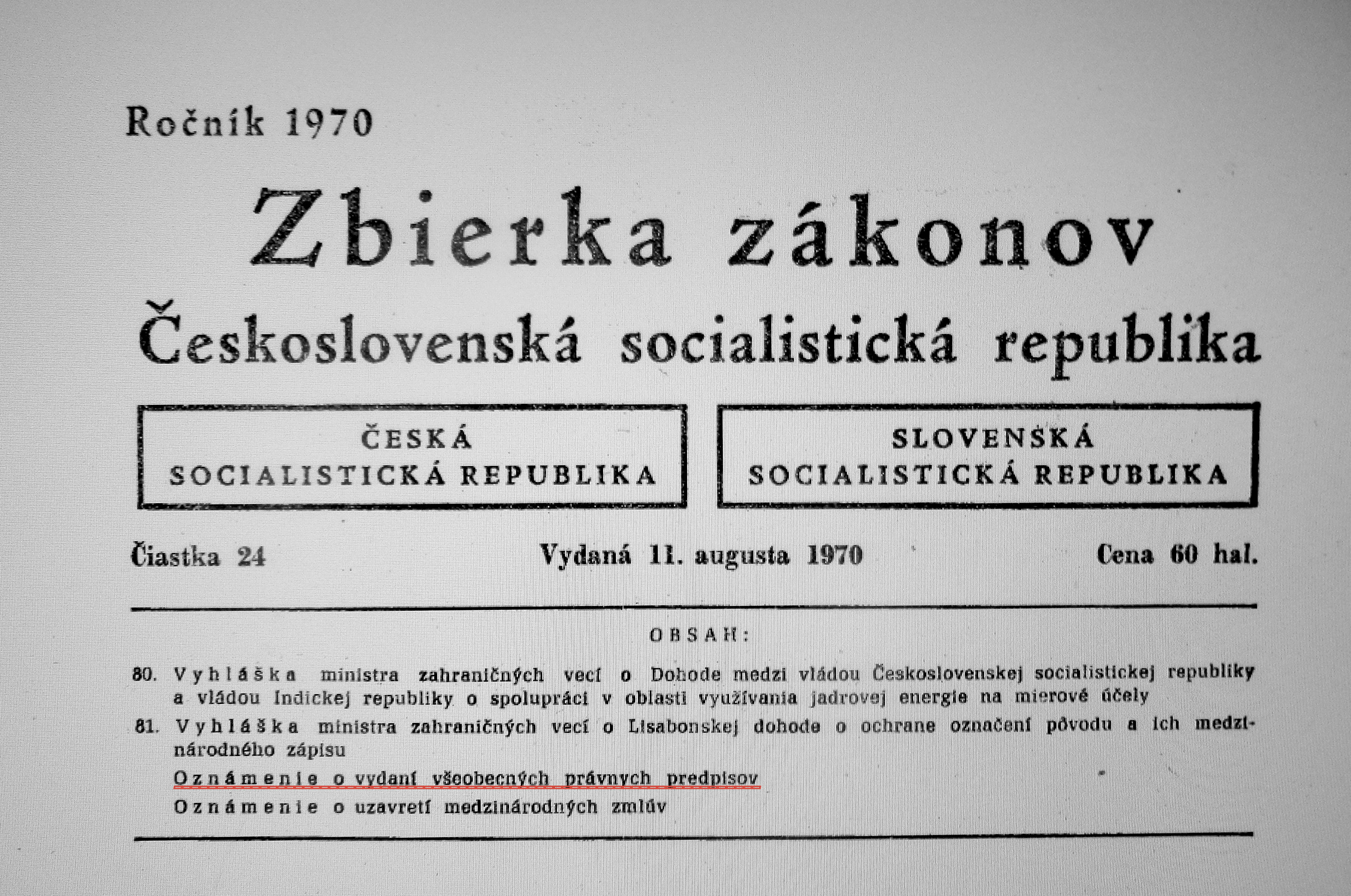 Detail zbierky zákonov Československej socialistickej republiky, čiastka 24 z 11.augusta 1970. Oznámenie o vydaní všeobecných právnych predpisov. Smernice o umiestňovaní prepustených vojakov z povolania, ....